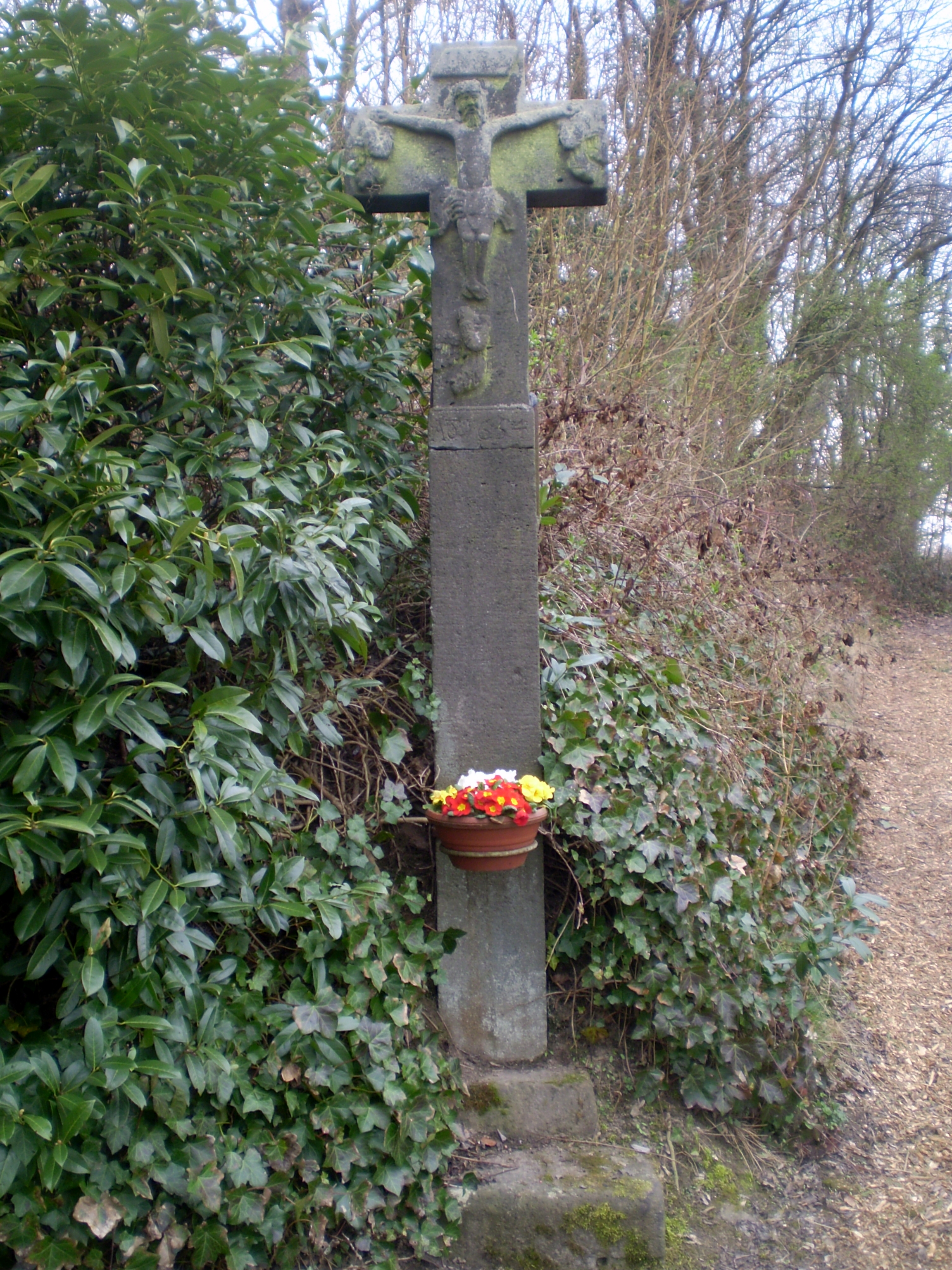 Wege-/Schaftkreuz (gegenüber) Schulstraße 39 in Rheinbreitbach, bezeichnet 1654